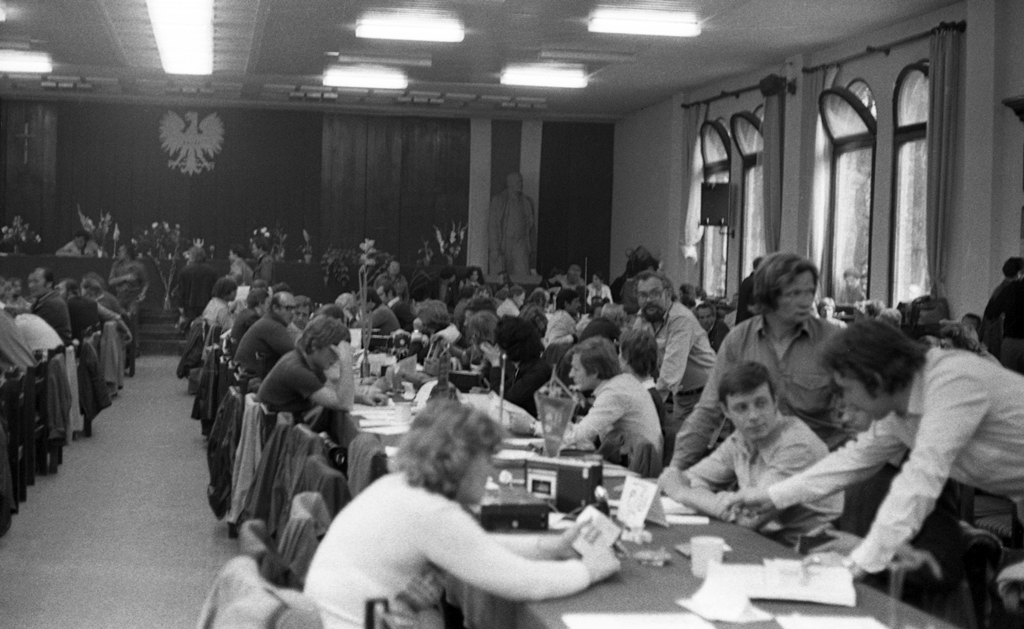 Delegaci strajkujących zakładów pracy w Sali BHP Stoczni Gdańskiej im. Lenina